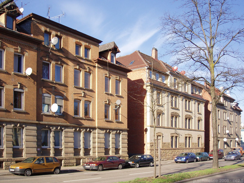 Historische Wohnhäuser in der Oststraße in Heilbronn